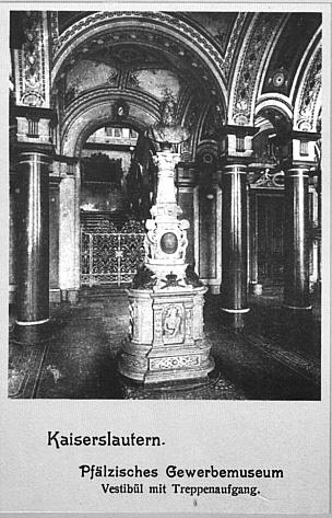 Eingangshalle, alte Pfalzgalerie, vor der Zerstörung von 1944